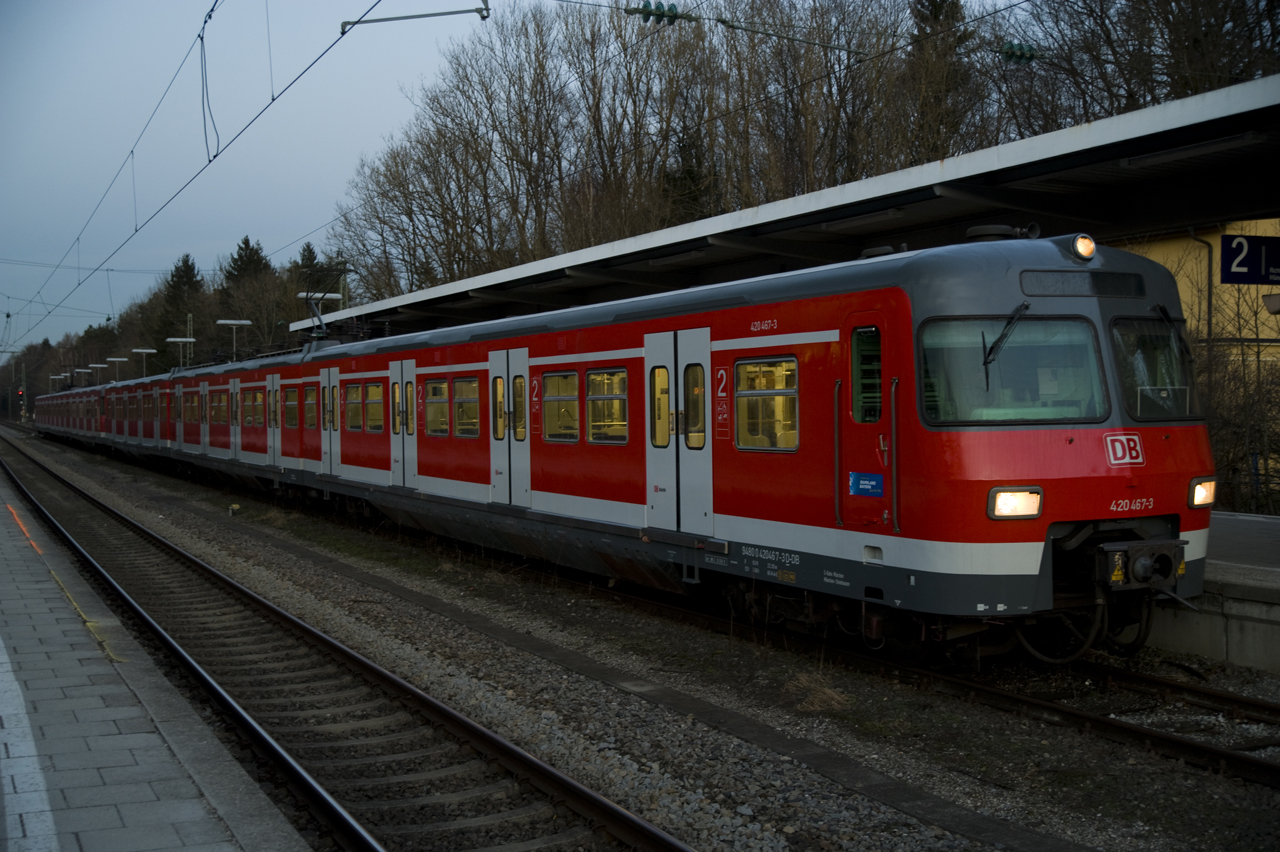 420 467-3 und eine weitere Einheit als S20 in Grafrath.